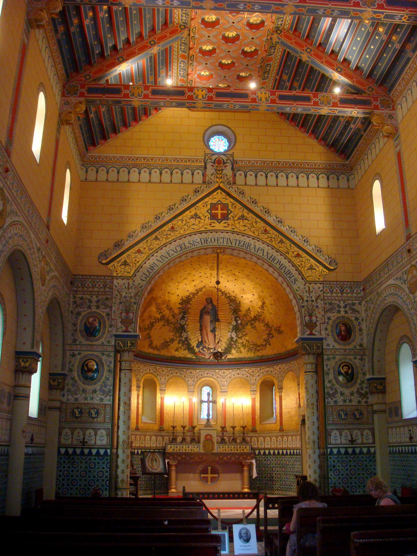 Intérieur de la chapelle impériale à Biarritz